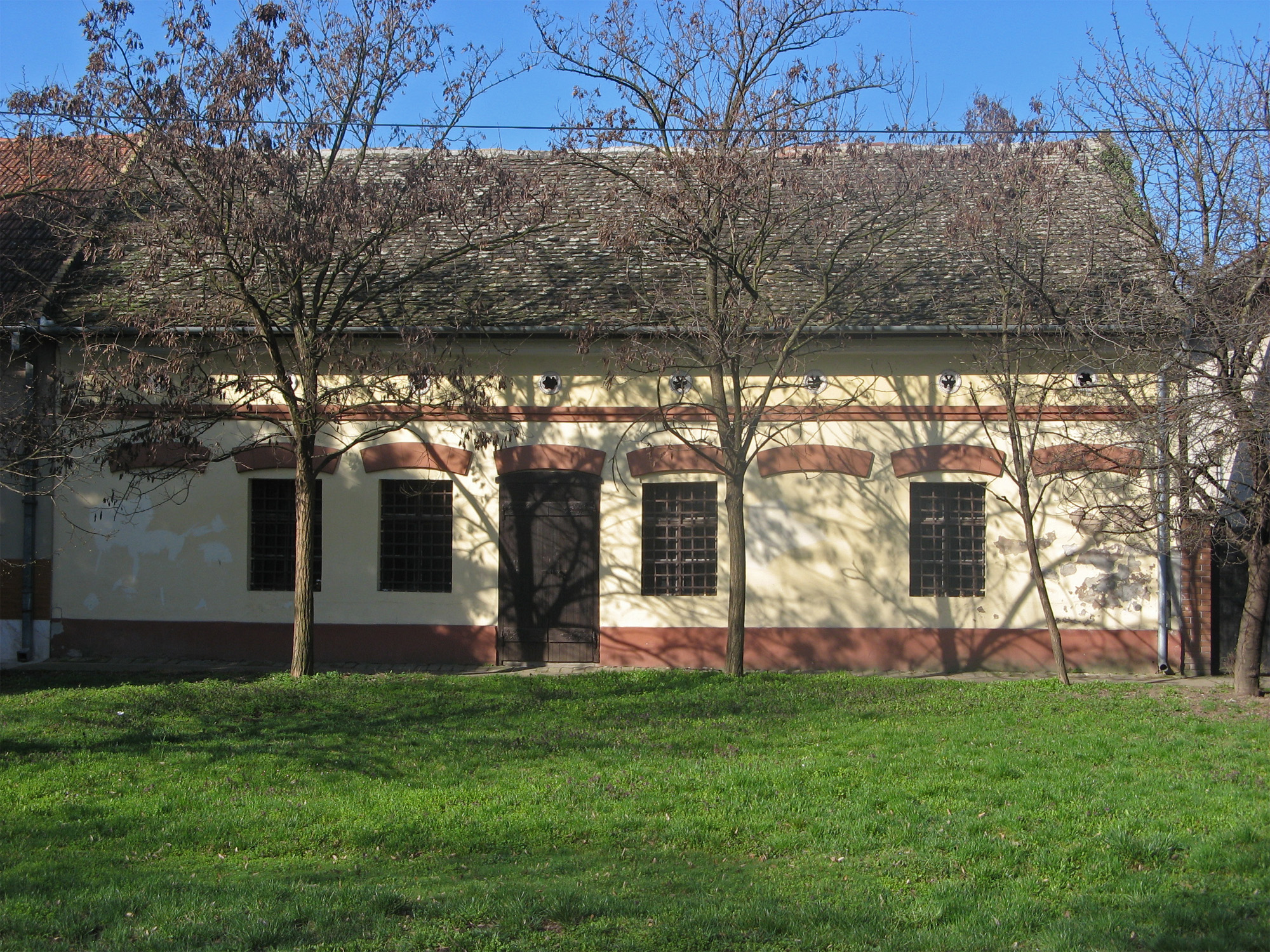 Kovács és bognárműhely Topolya - Műemlék